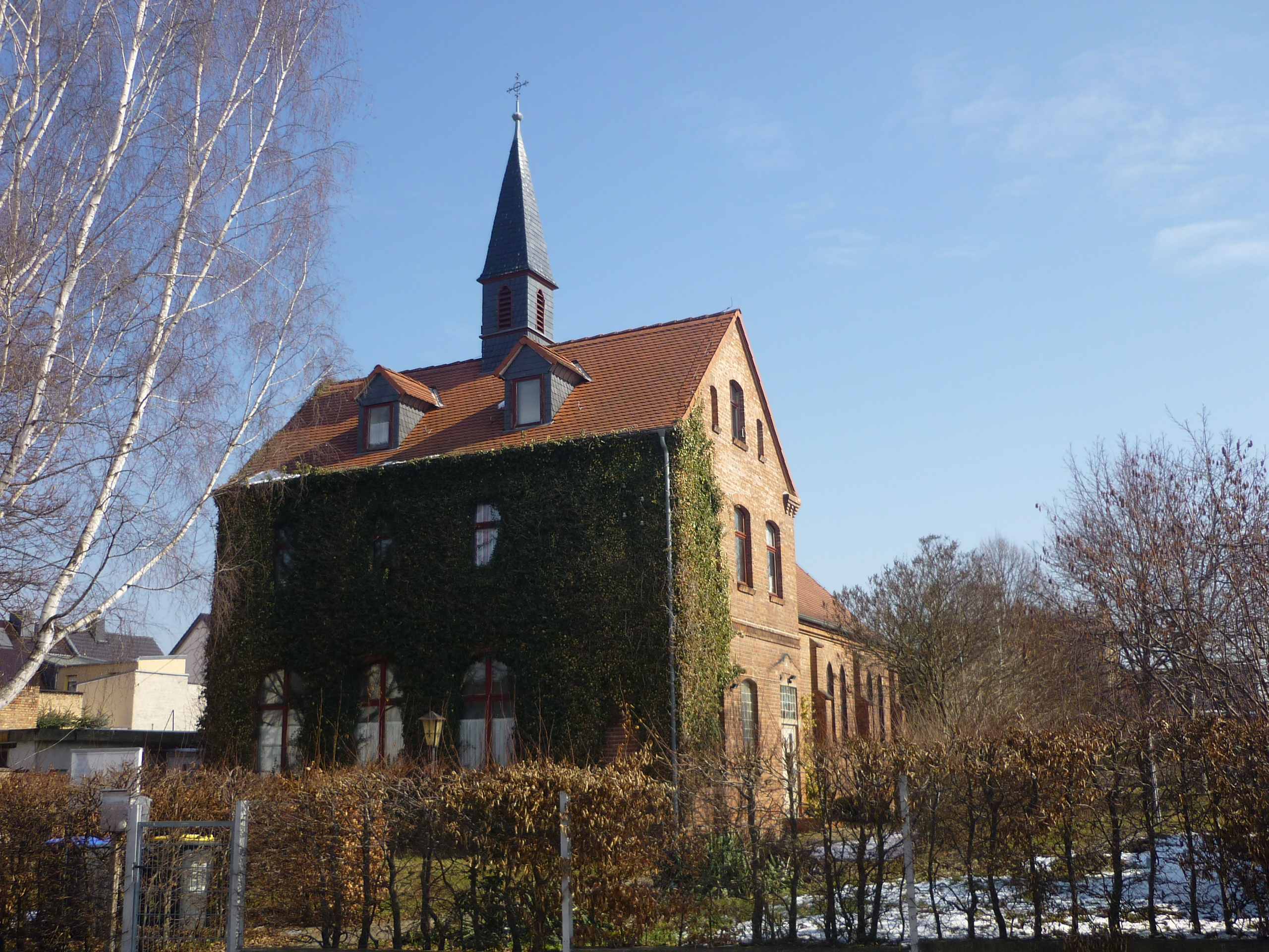 Kath. Kirche